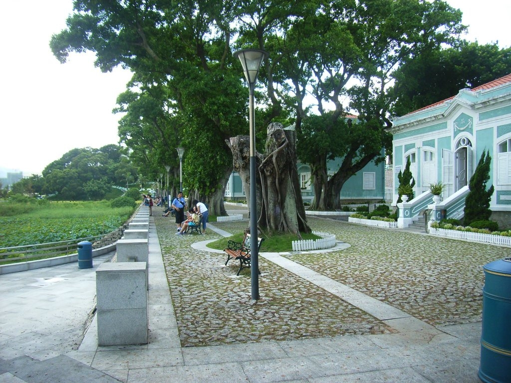 氹仔的 龍環葡韻, 是由zh:澳門八個文化界代表組成的「澳門八景評議會」選定為澳門八景之一, 位於zh:龍環葡韻住宅式博物館